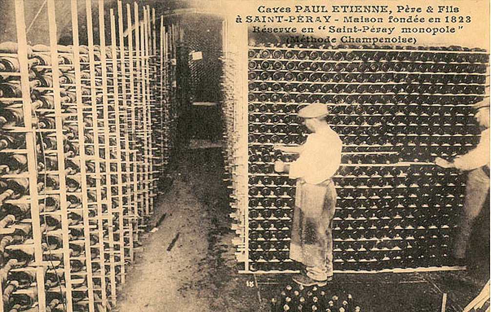 Cave Paul Étienne : stockage du saint-péray